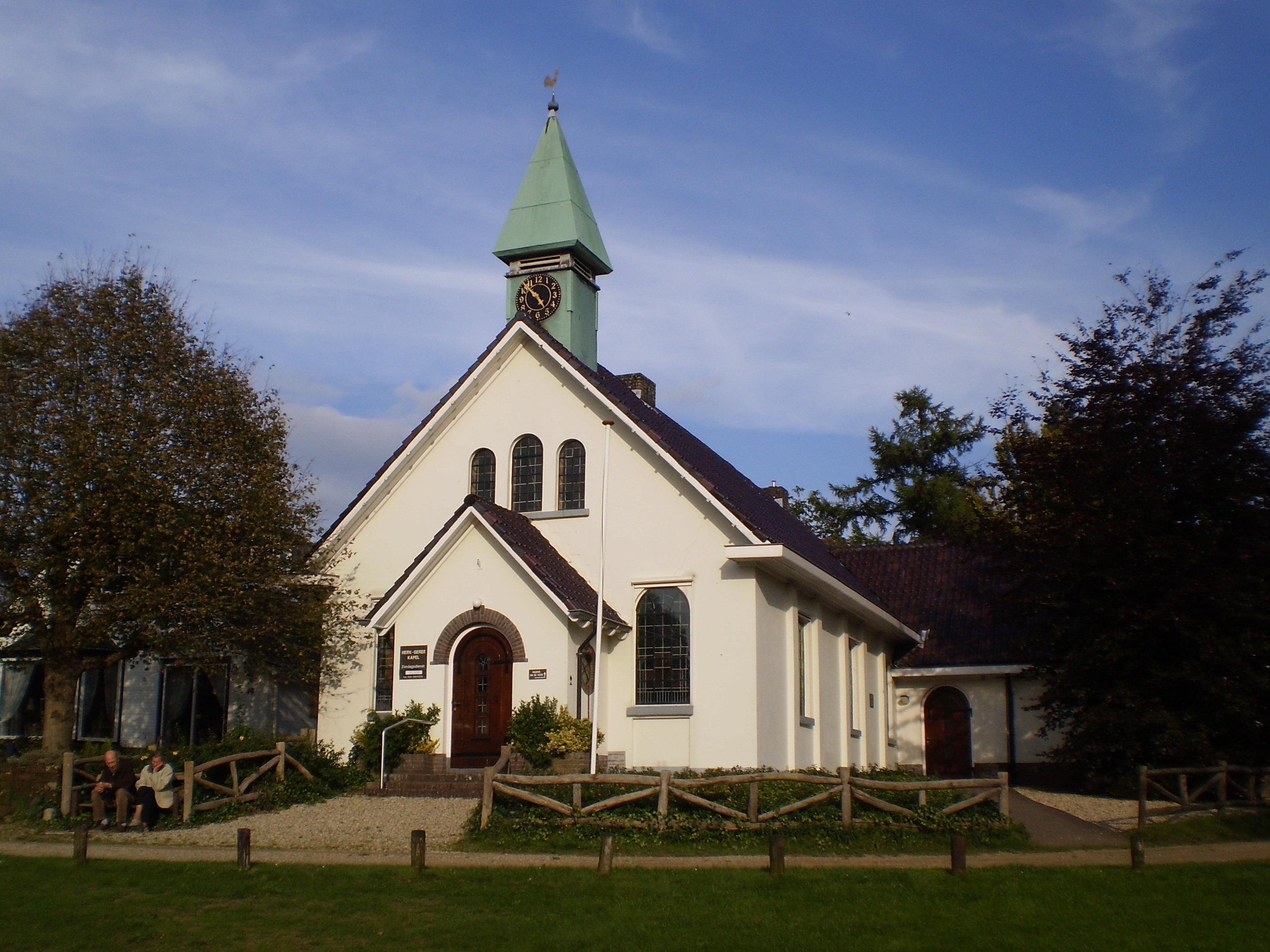 Kapel (Protestantse Kerk) in Hoog Soeren, gemeente Apeldoorn, NL (1904)